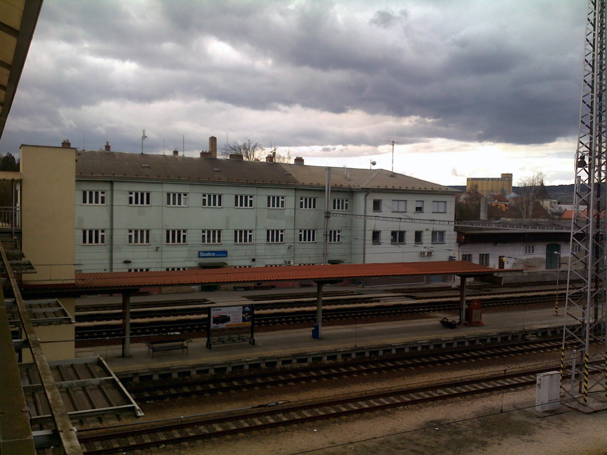 Železniční stanice ve Skalici nad Svitavou